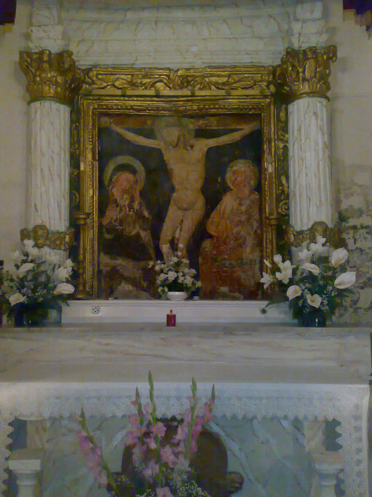 Lizzano, cappella del Crocifisso: deesis sull'altare maggiore.